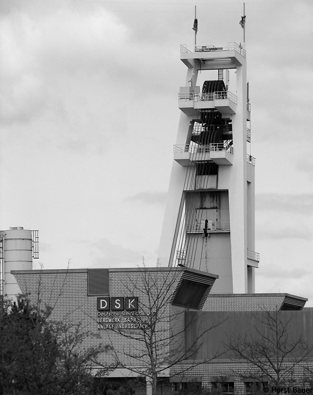 Der auf 1751 m geteufte Nordschacht des Bergwerks Saar war einmal der tiefste Schacht Europas.